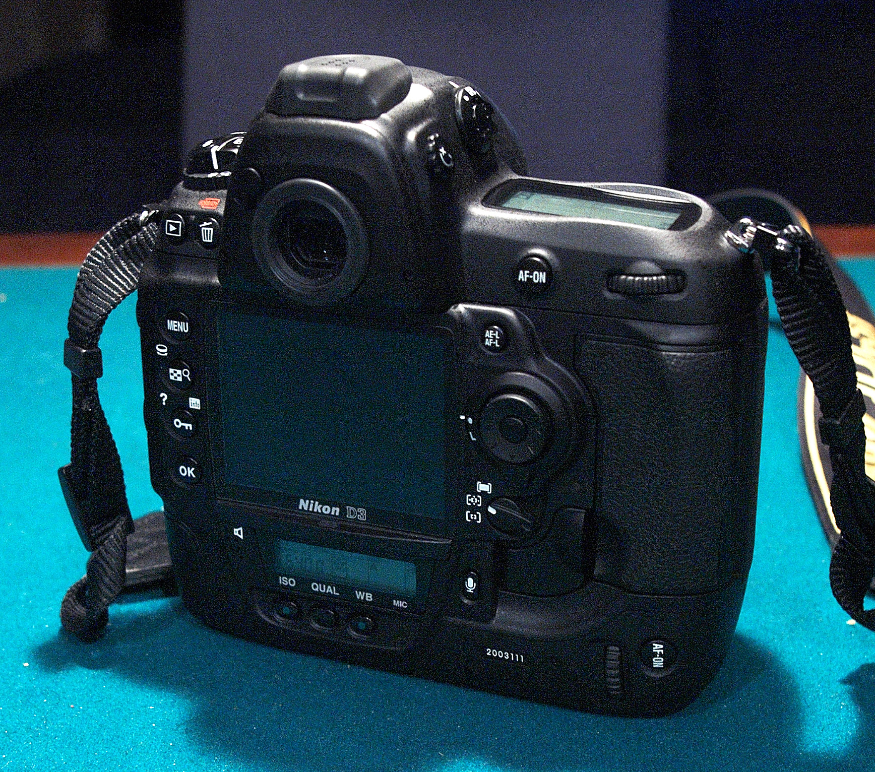 nikon d3